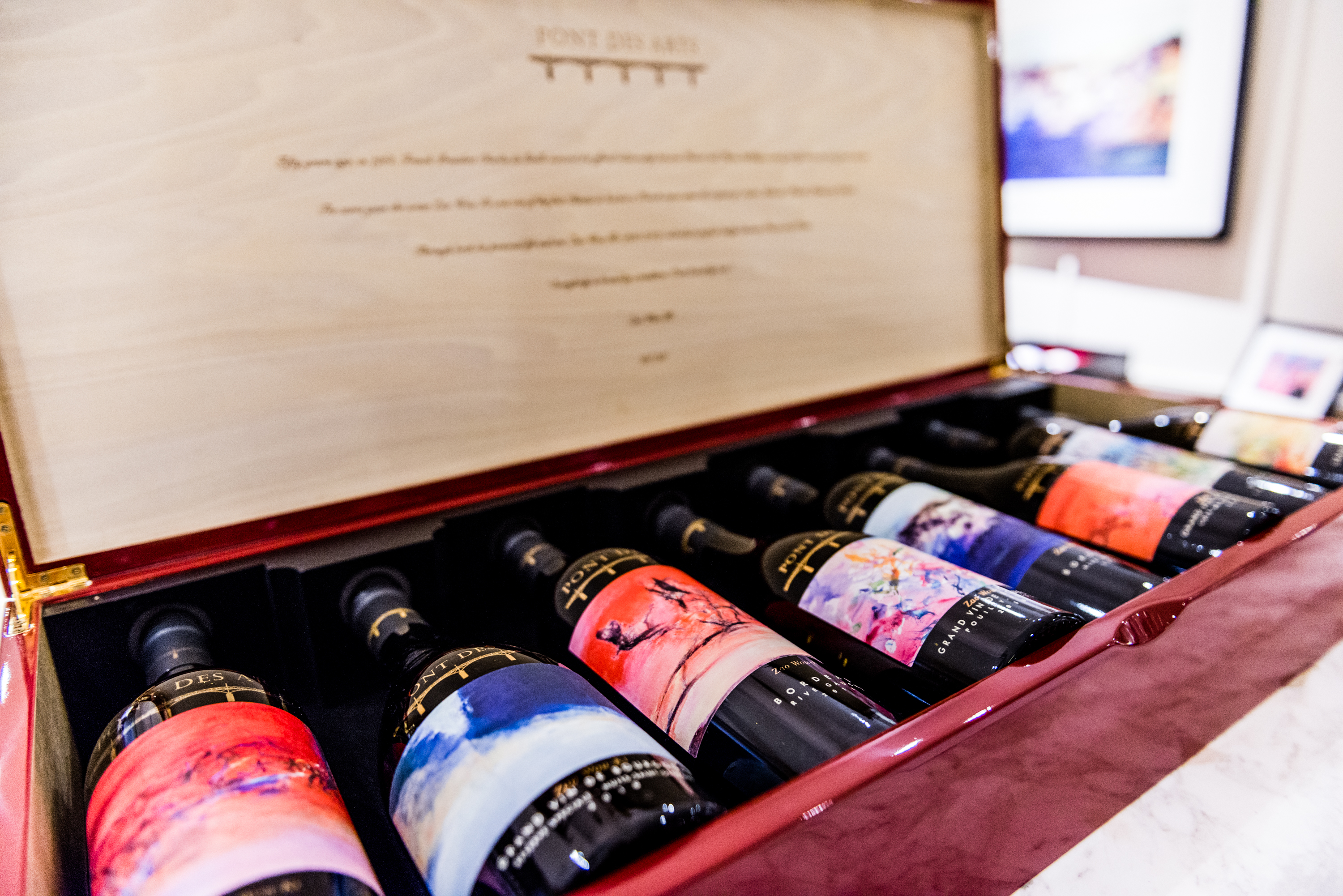 Pont des Arts Wine Collection